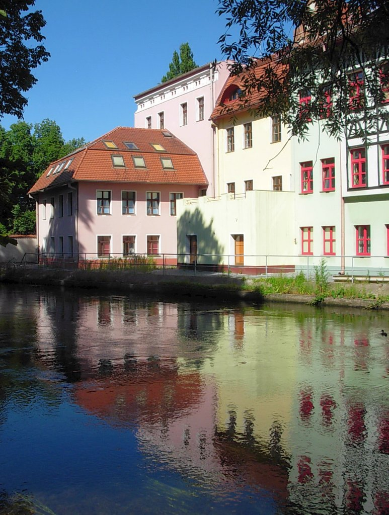 Ulica Przyrzecze w Bydgoszczy, Wenecja Bydgoska